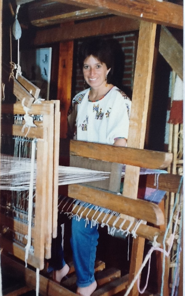 Patricia Green en 1986 tejiendo en un telar de seis pedalesn en San Miguel Allende, Guanajuato.